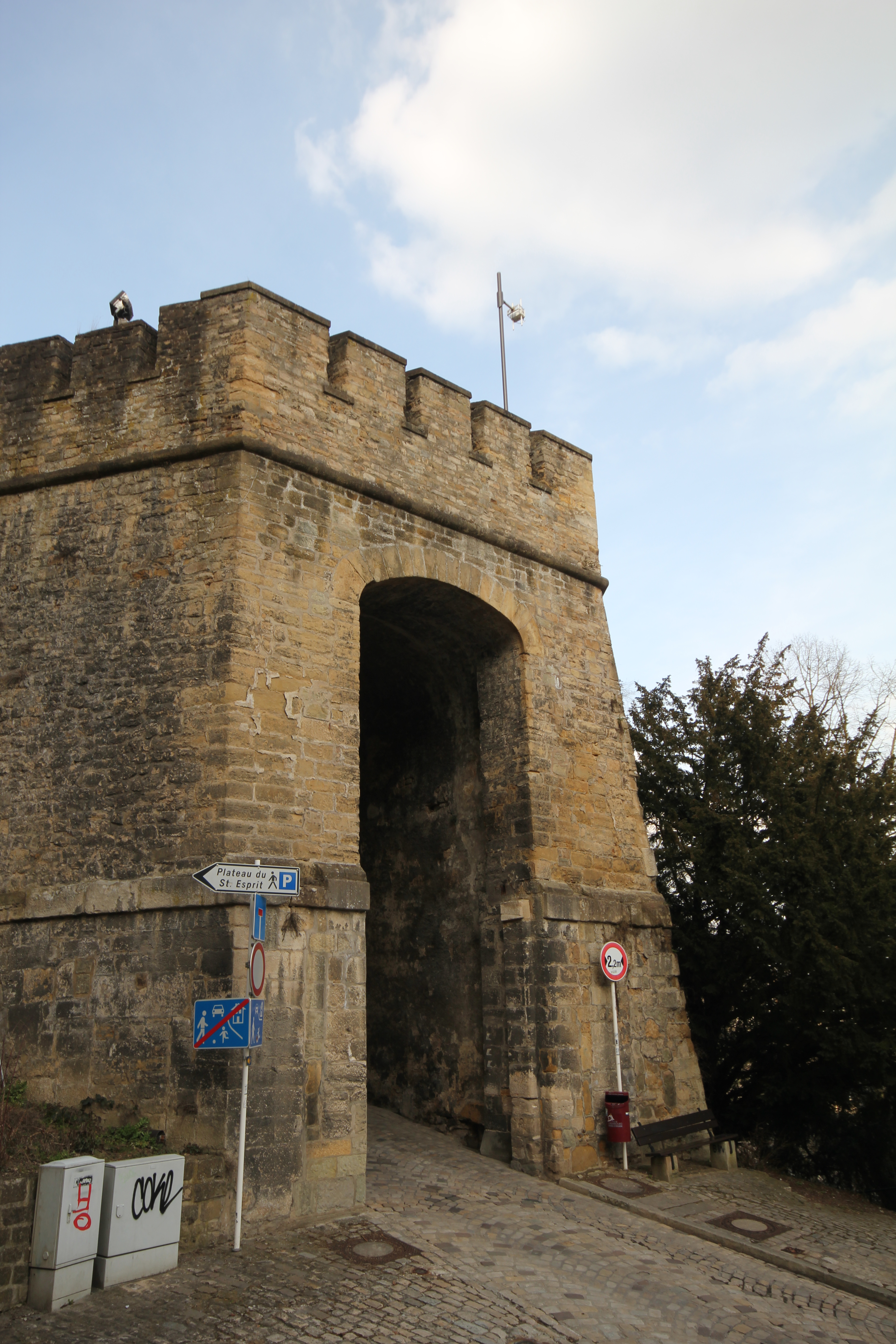 Uewerstad, Lëtzebuerg, Luxembourg